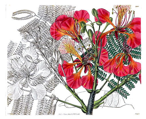 Royal Poinciana in Curtis's, described as Delonix Poinciana regia (Delonix regia).